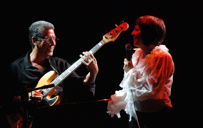 Fotografía de la compositora y cantante de música popular uruguaya Laura Canoura, junto al bajista Cono Castro en el espectáculo "Canoura canta el tango" en el Centro Cultural de Maldonado.